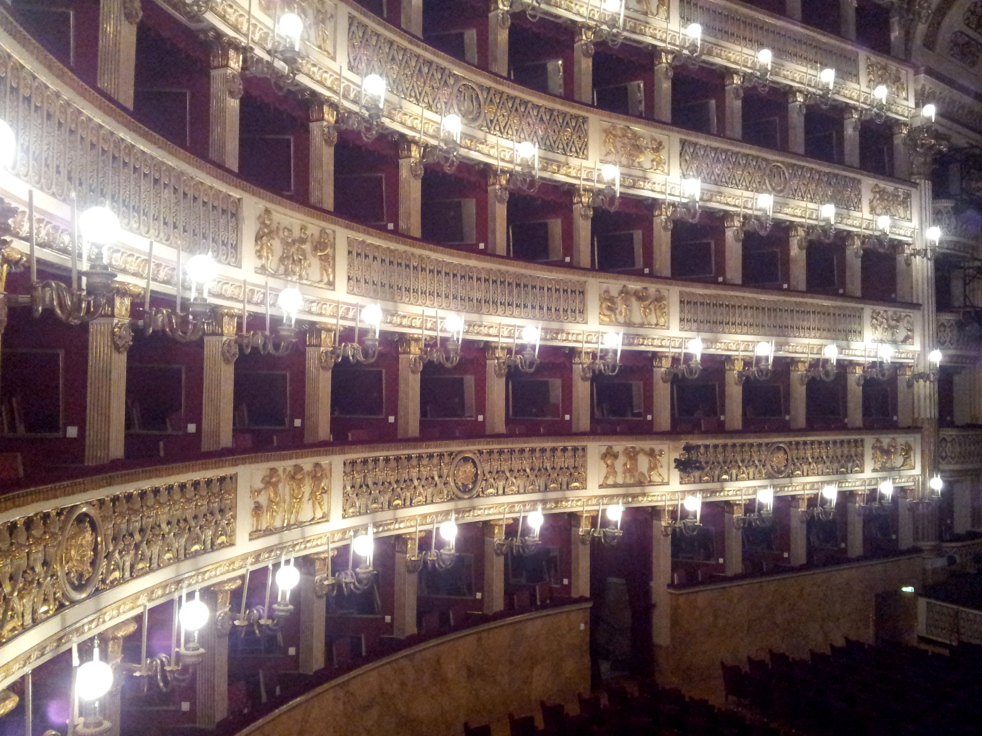 Latro sinistro del Real Teatro di San Carlo di Napoli.